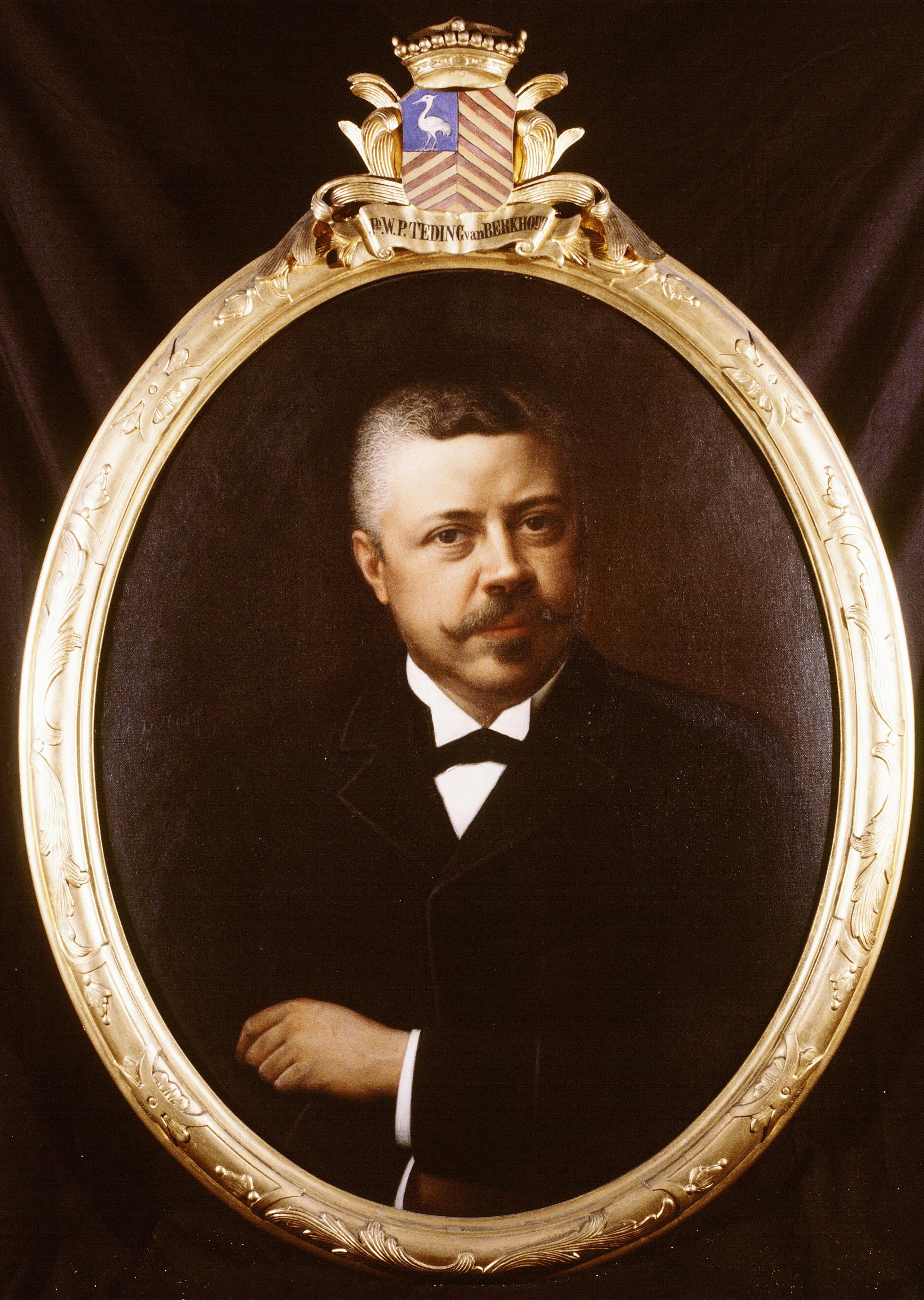 Portret van jonkheer Willem Philip Teding van Berkhout (1851-1905), burgemeester Haarlemmerliede en Spaarnwoude; regent Hofje van Noblet te Haarlem (1889); Gildebroeder van het Sint Jacobsgilde te Haarlem (1893-1905), secretaris en thesaurier van het Gilde (1894-1905).